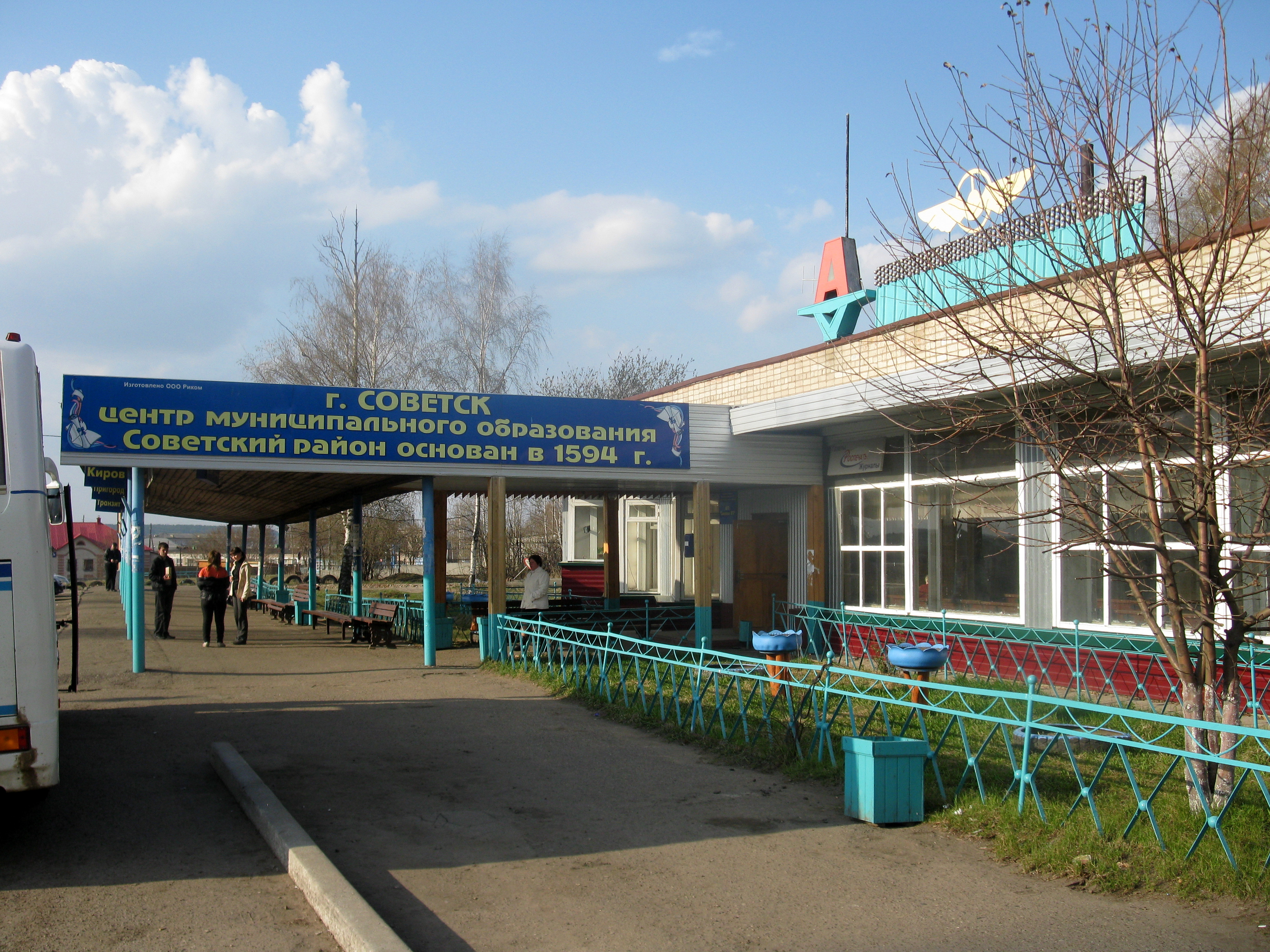 Автовокзал